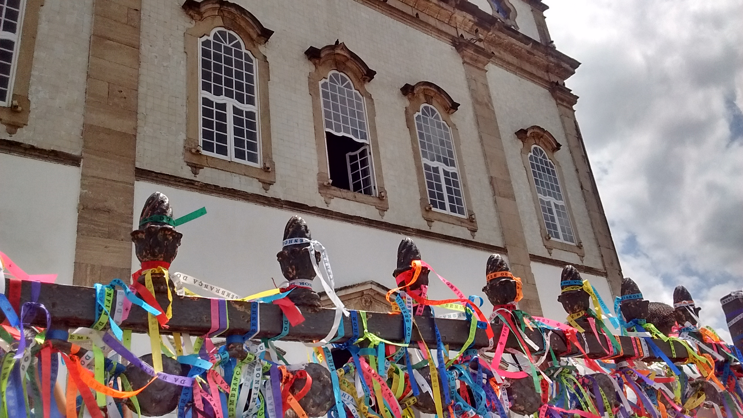 Fitas em frente à Igreja do Senhor do Bonfim em Salvador, Bahia